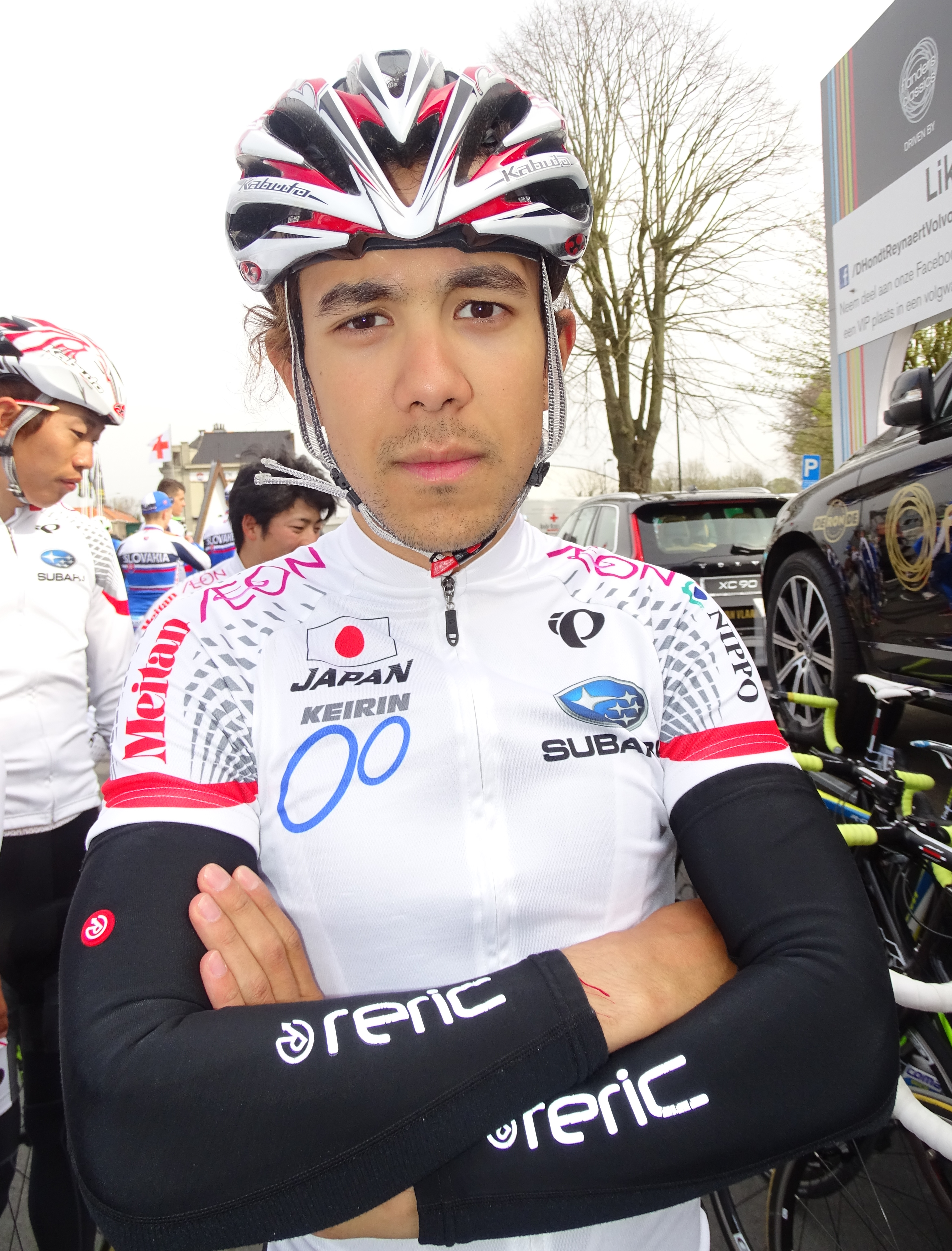 Reportage réalisé le samedi 9 avril à l'occasion du départ et de l'arrivée du Tour des Flandres espoirs 2016 à Audenarde, Belgique.